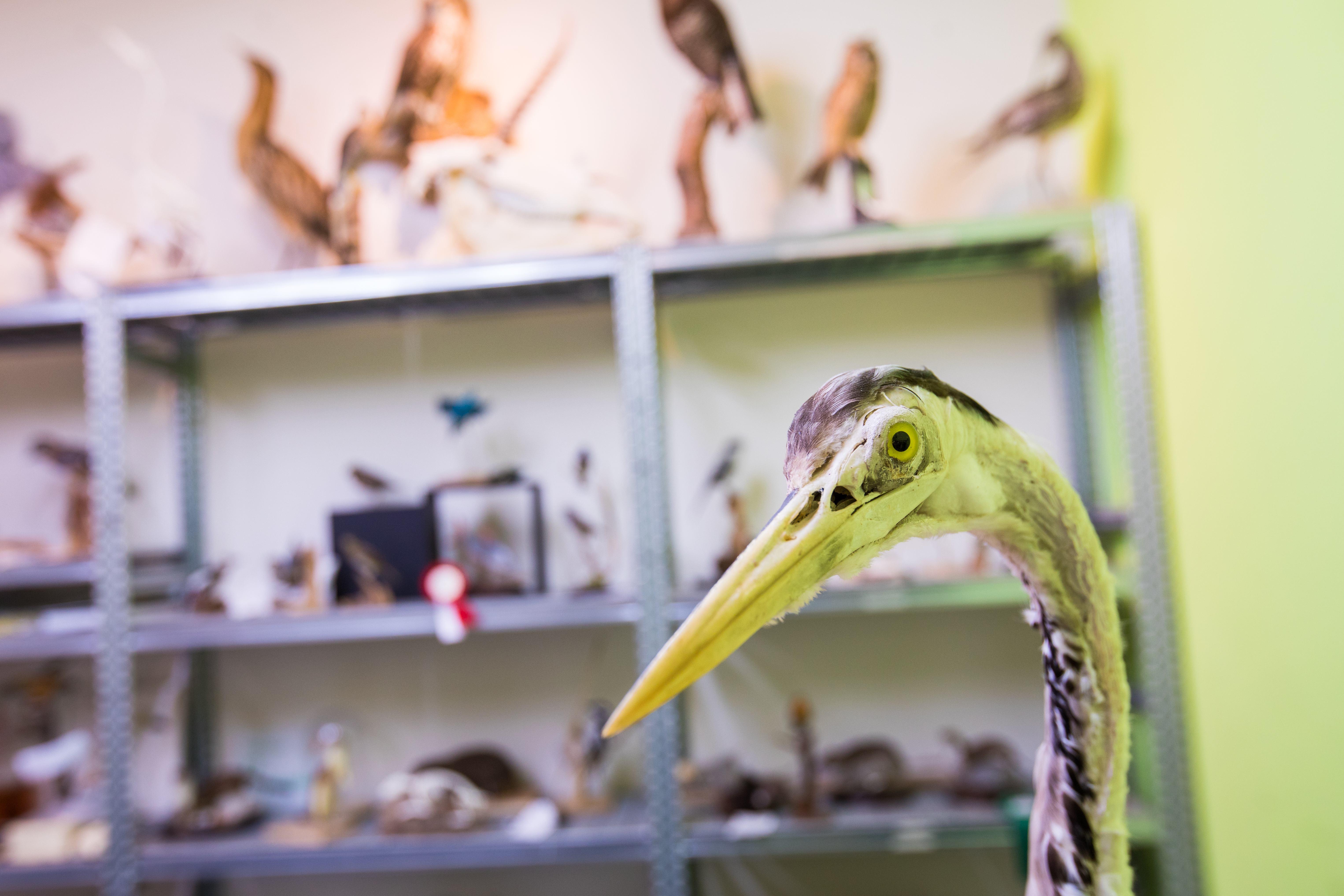 Het Natuurmuseum Fryslân heeft een eigen preparateursteam. In het Open Atelier zetten de preparateurs allerlei dieren op, van mus tot olifant. Bezoekers zijn van harte welkom om te komen kijken. De preparateurs leggen graag uit wat ze aan het doen zijn: het opzetten van een vogel of zoogdier, het prepareren van een skelet, of het maken van modellen en afgietsels.